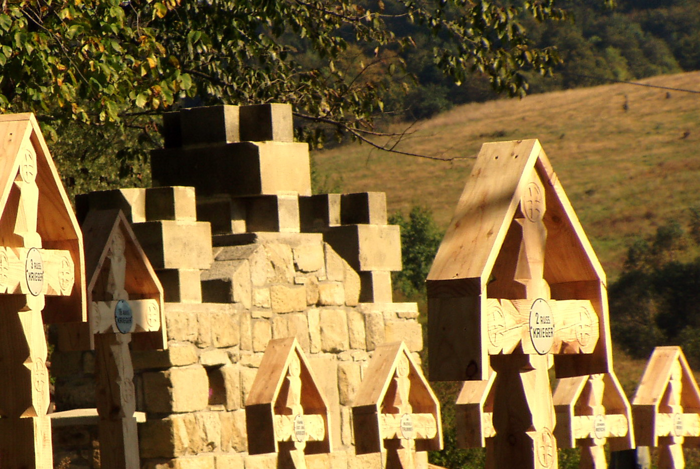 Cmentarz wojenny nr 3 w Ożennej